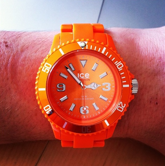 Eine in orange gehaltene ice watch.